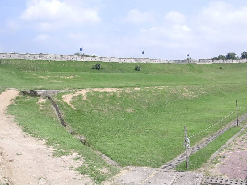 Les remparts de Suwon, près de Séoul en Corée du Sud.